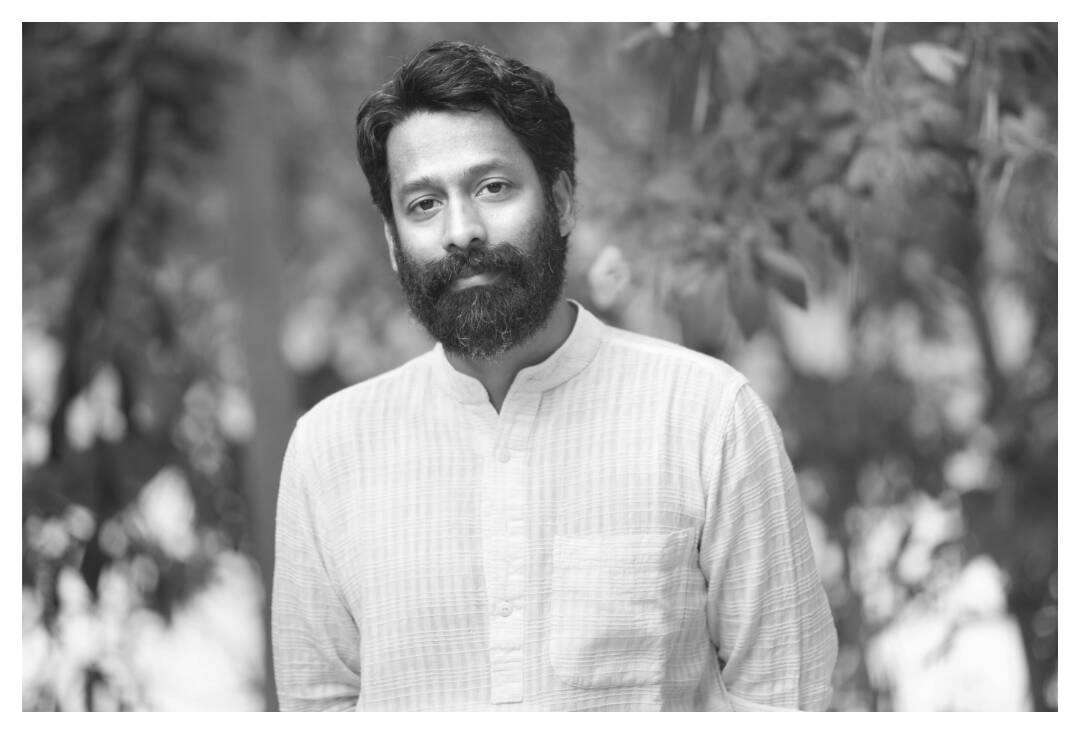 മിസ്റ്റിക് എഴുത്തുകാരൻ